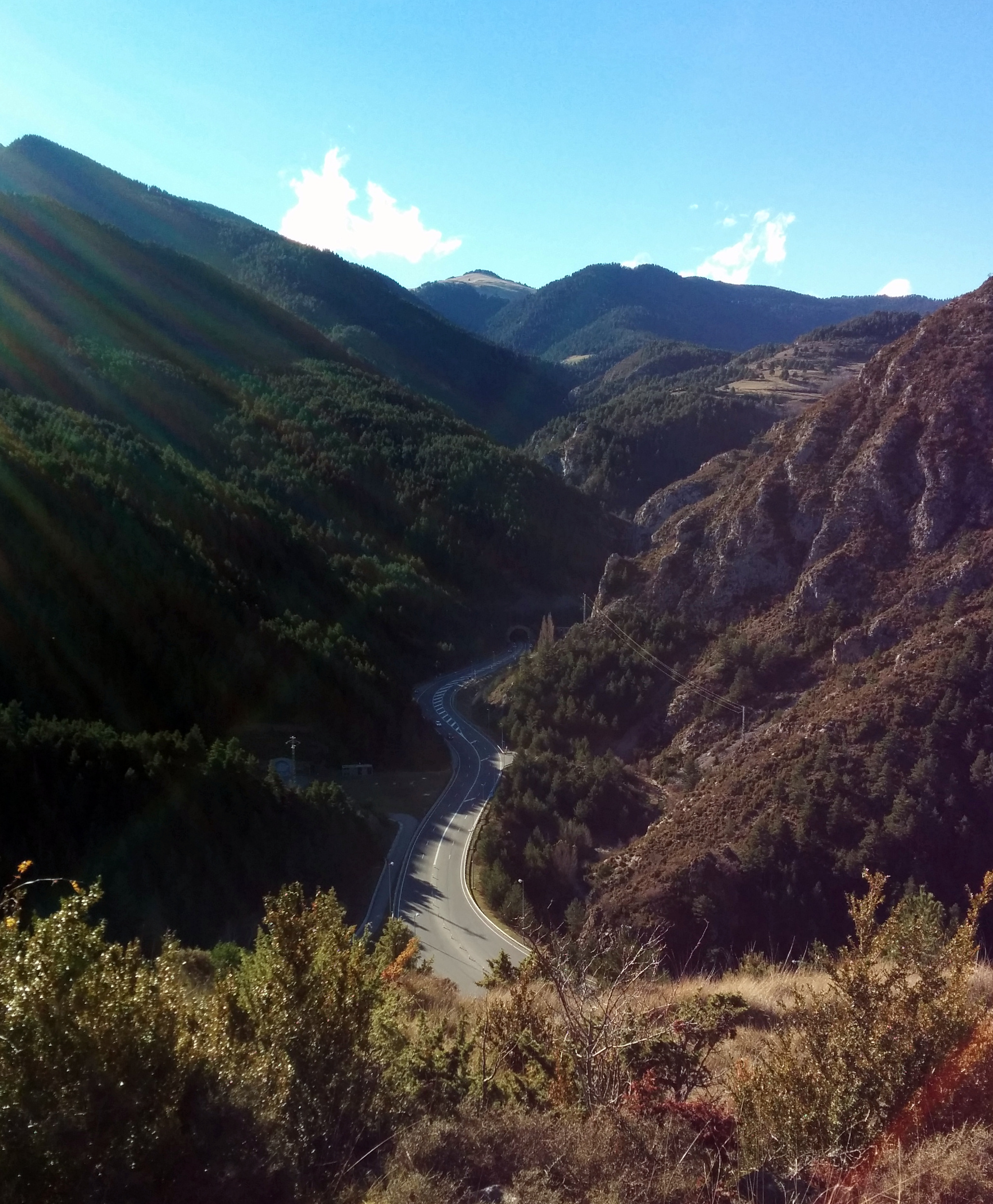 Túnel del Cadí (Urús)